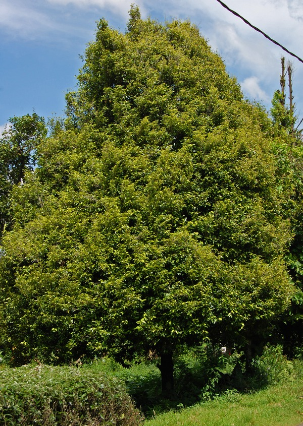 Myristica fragrans, habits. Darmaga, Bogor, West Java, Indonesia